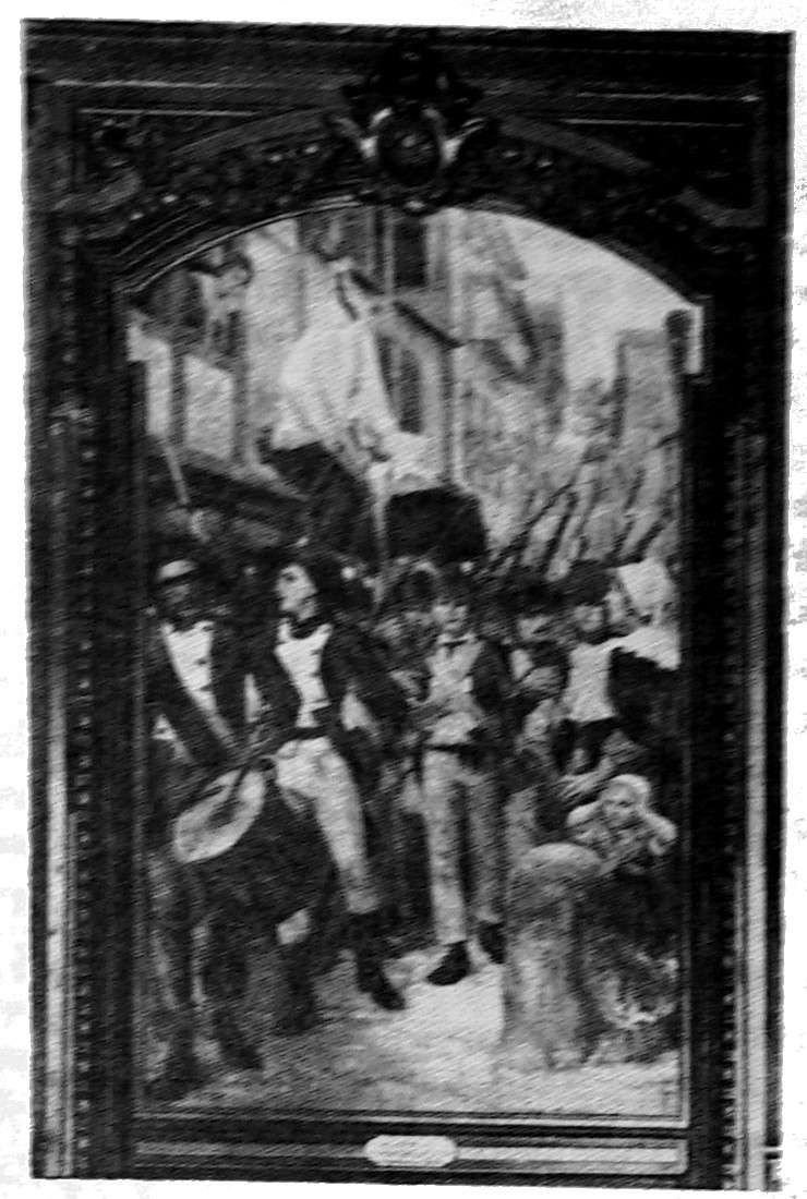 soldats de 1792 peinture de lacatte sur le mur d'une salond de la mairie, provenant de la bibliothèque de Reims.